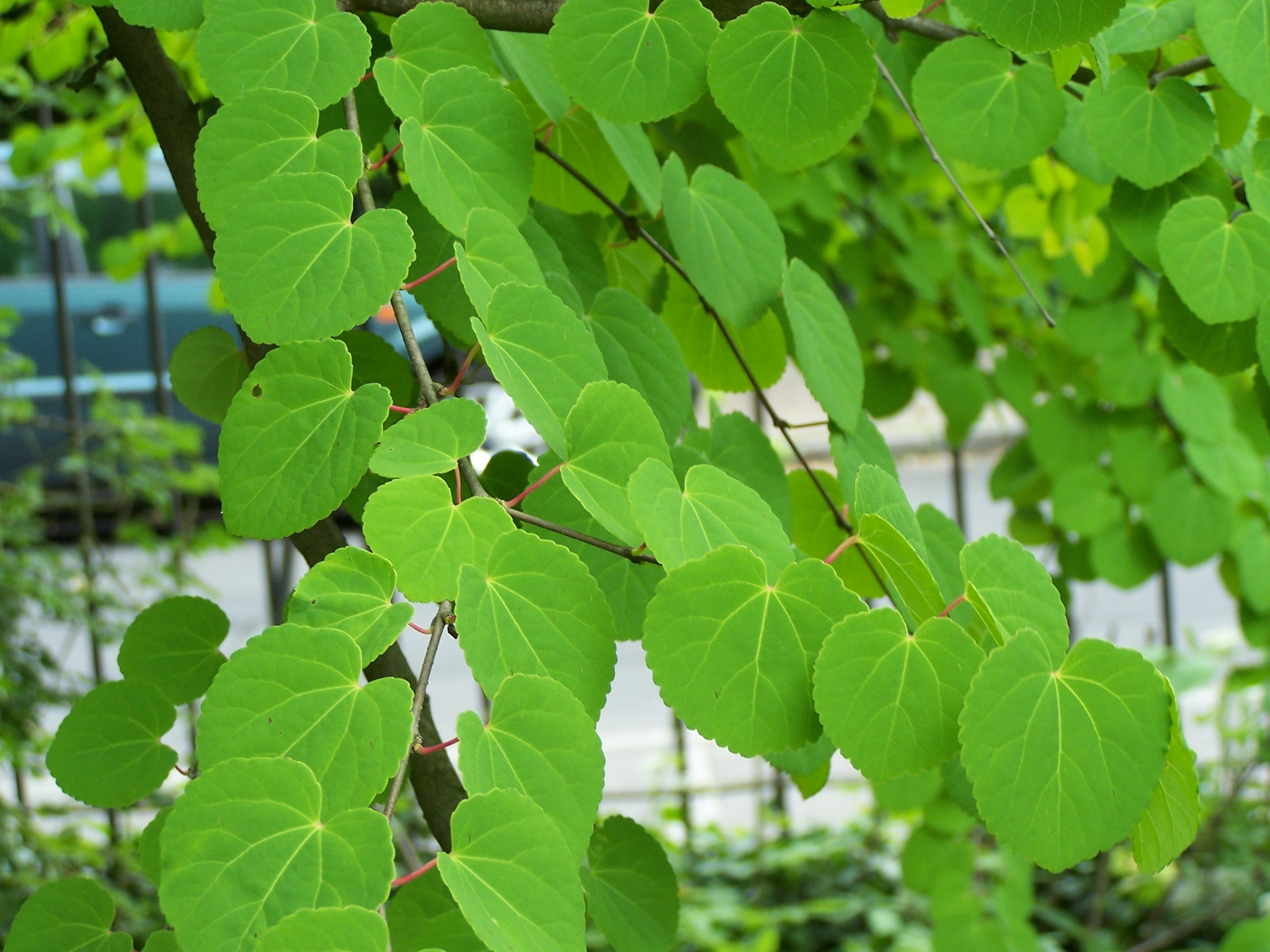 Cercidiphyllum japonicum 17 juin 2006 Vieux jardin botanique de Göttingen